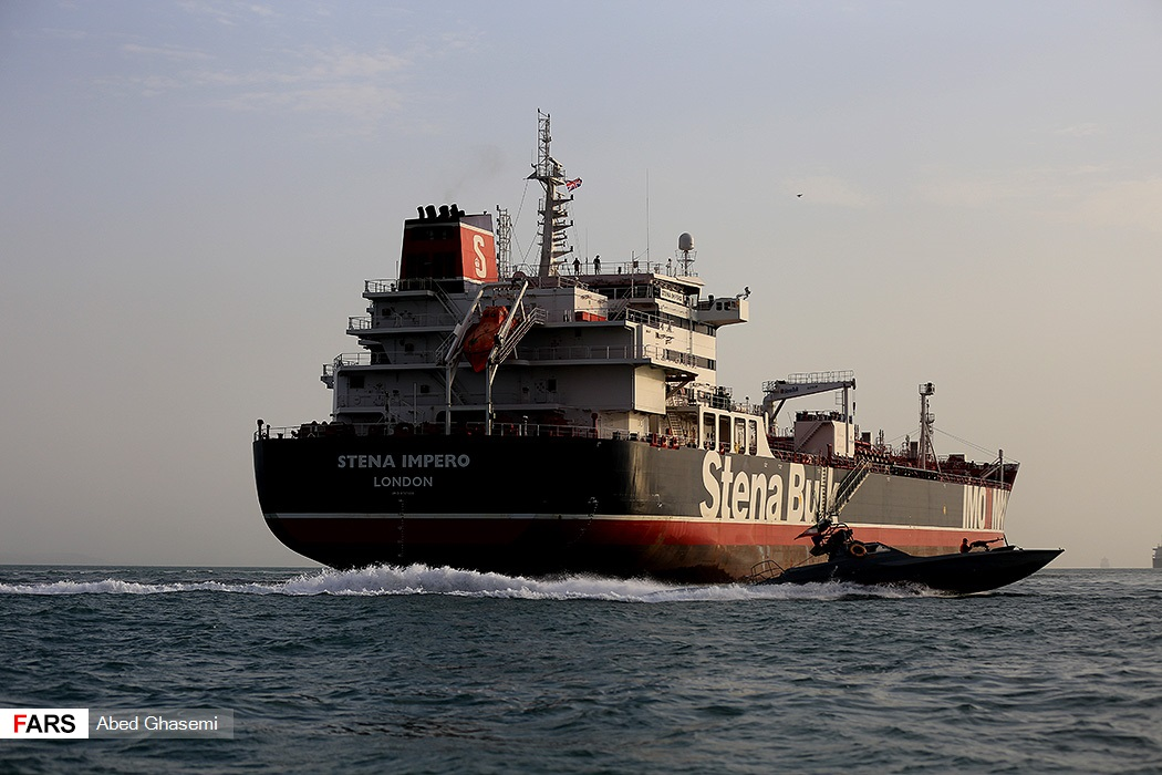 نفتکش انگلیسی استینا ایمپرو، توقیف‌شده توسط ایران